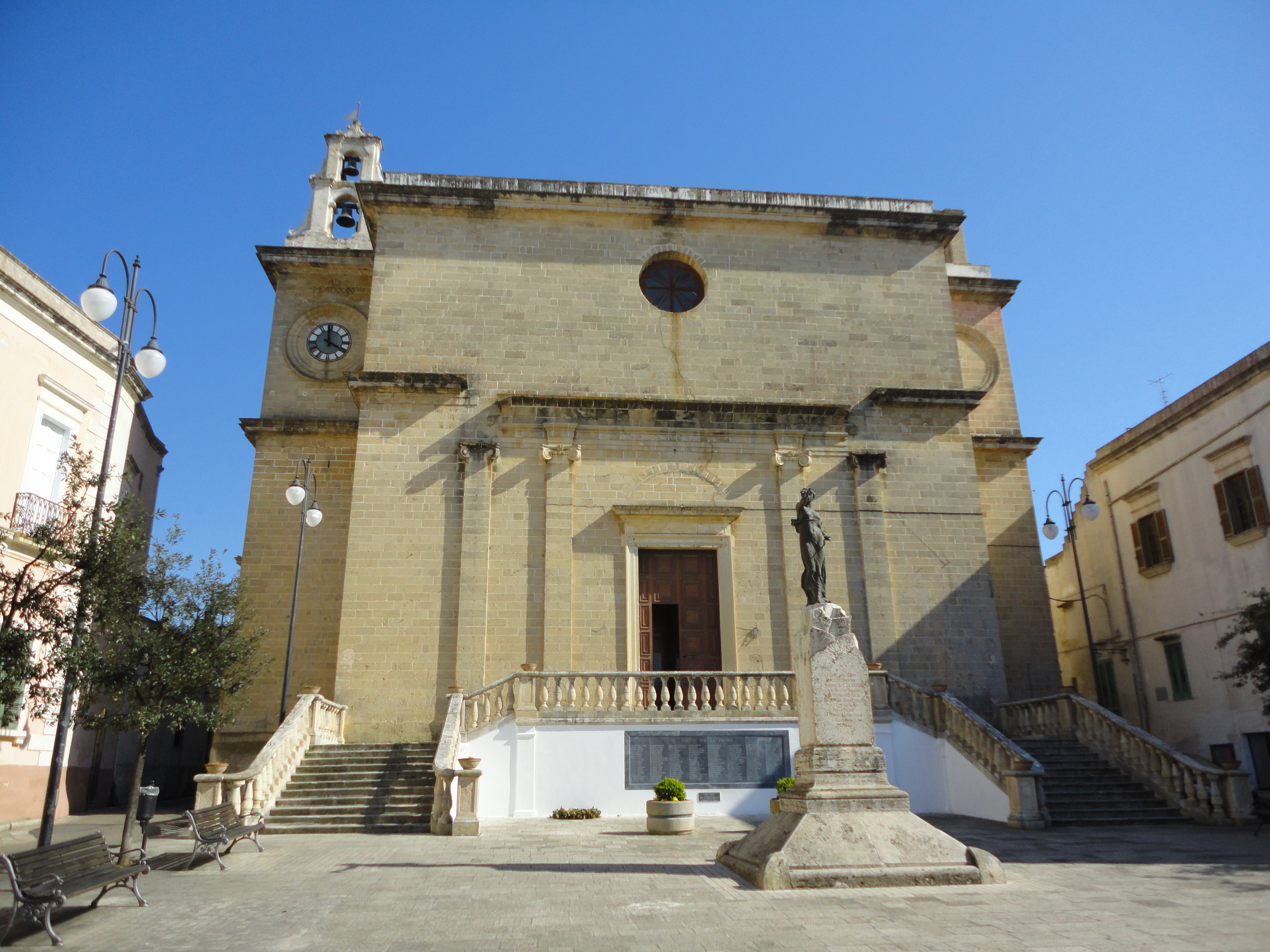 Chiesa dell'Addolorata Alezio, Lecce, Puglia, Italy